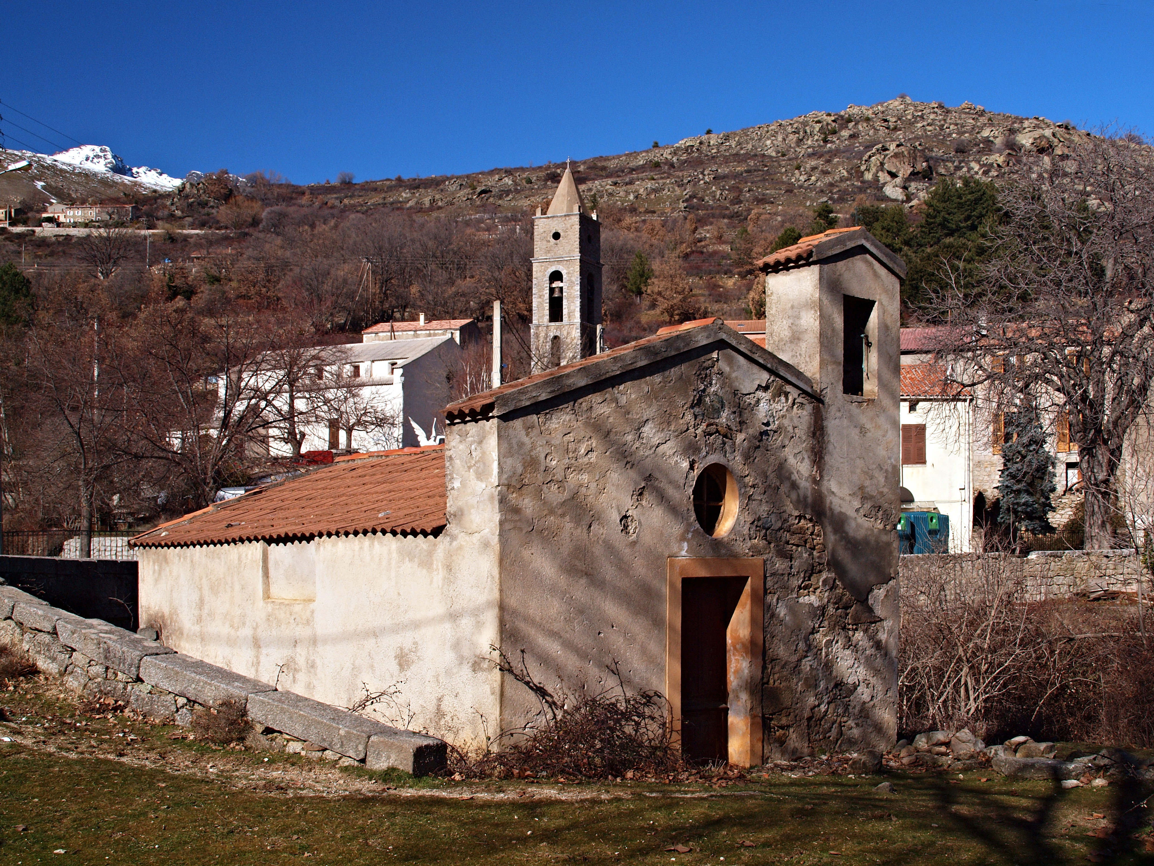 Albertacce (Corse) - Chapelle Saint Hyacinthe Corsu: Albertacce (Corsica - San Ghjacintu